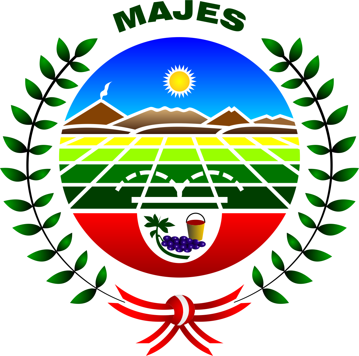 Distrito de Majes - Provincia de Caylloma - Región Arequipa